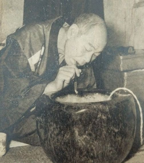 五代目笑福亭松鶴